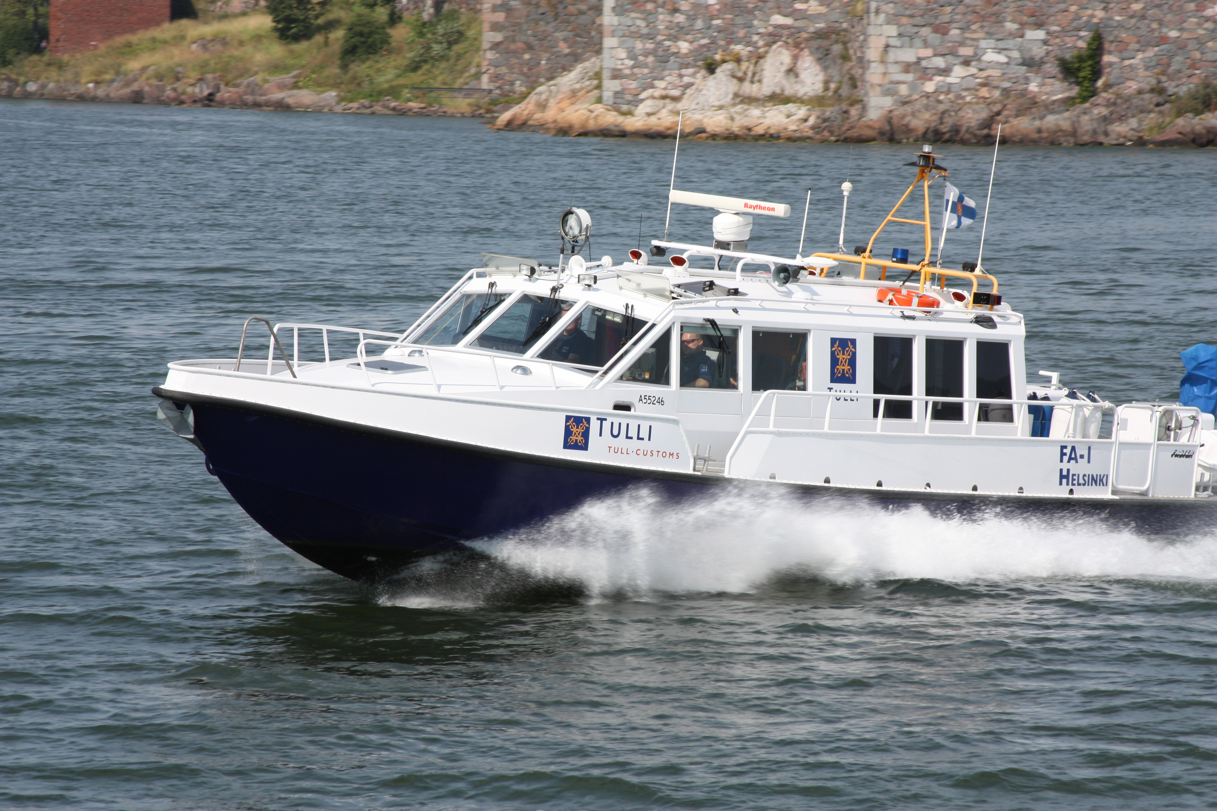 tourist pictures of Helsinki